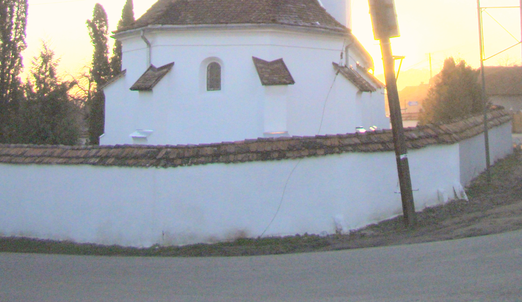 Zidul de incintă, sat Sărățeni; comuna Sărățeni 02